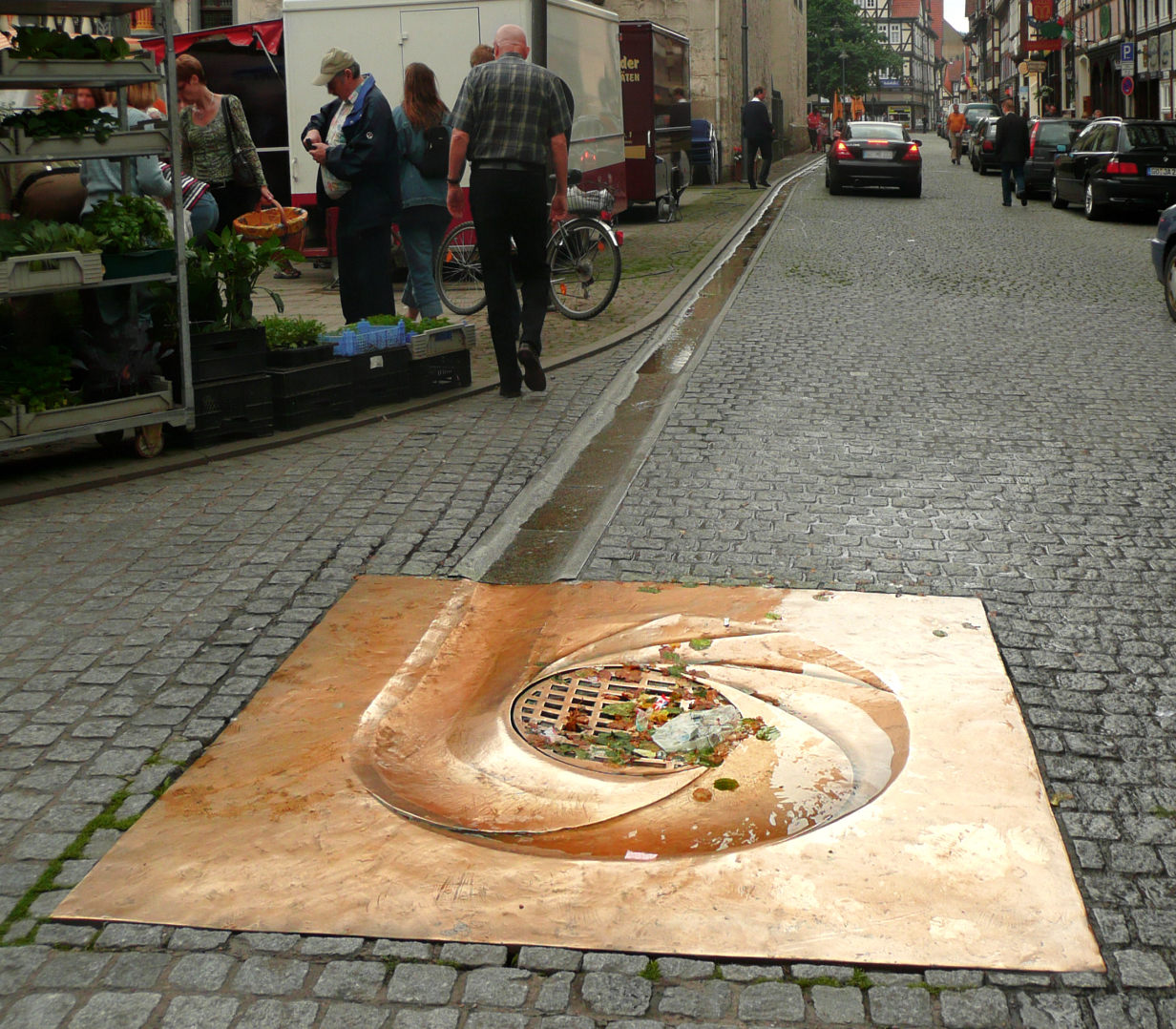 Rinnstein und Abfluss im Straßenbelag in Hann. Münden